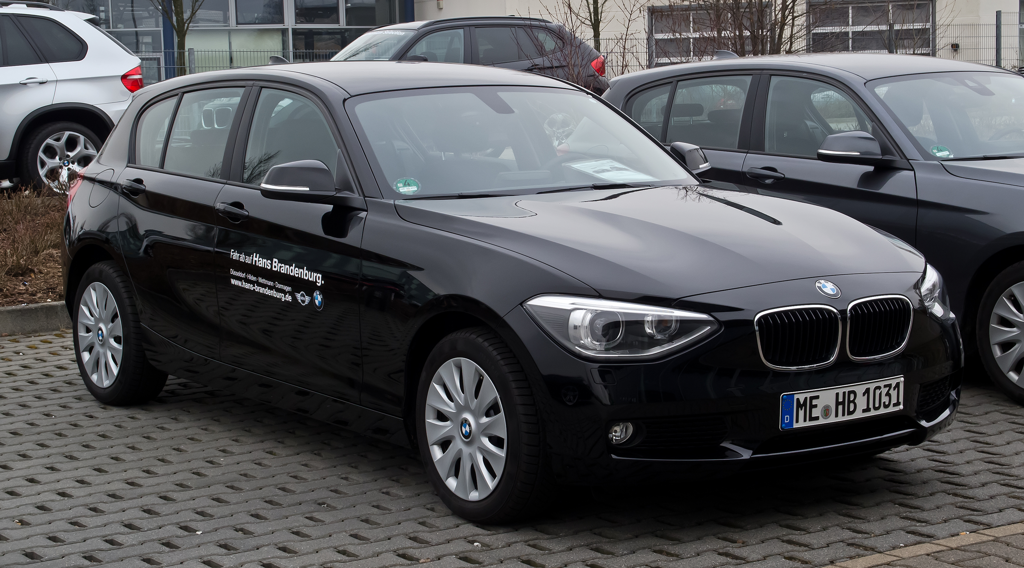 BMW 116i (F20)